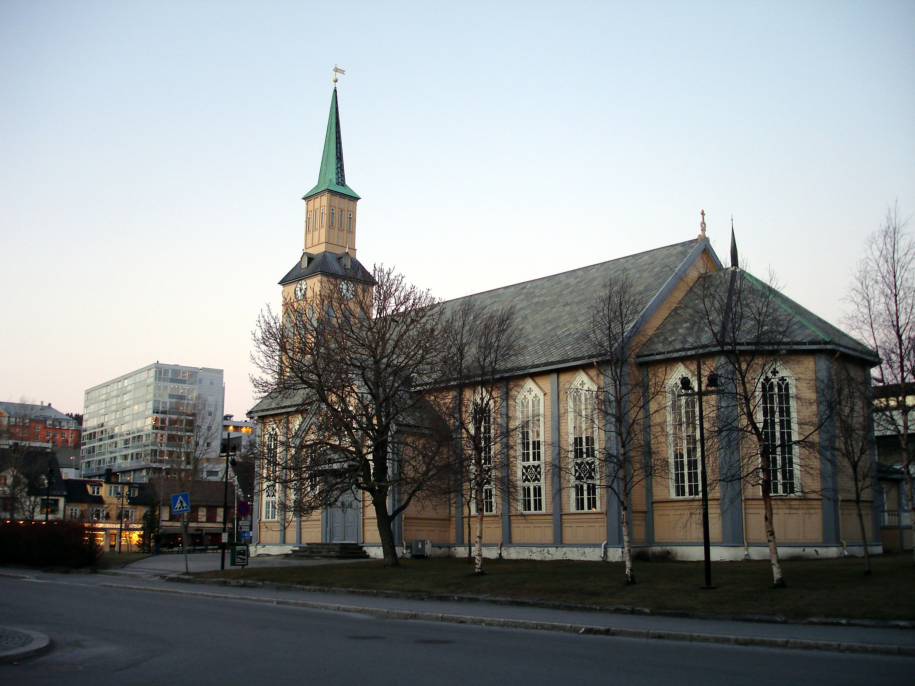 Tromsø Domkyrkje